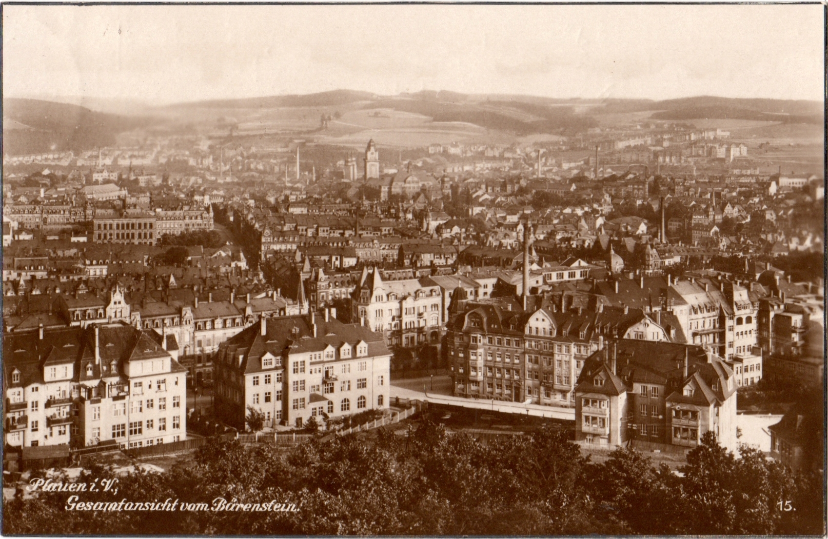 Ansichtskarte aus Plauen mit Blick vom Bärenstein Richtung Südosten. Etwa in der Mitte ist die Johanniskirche zu sehen. Karte gelaufen 1926.